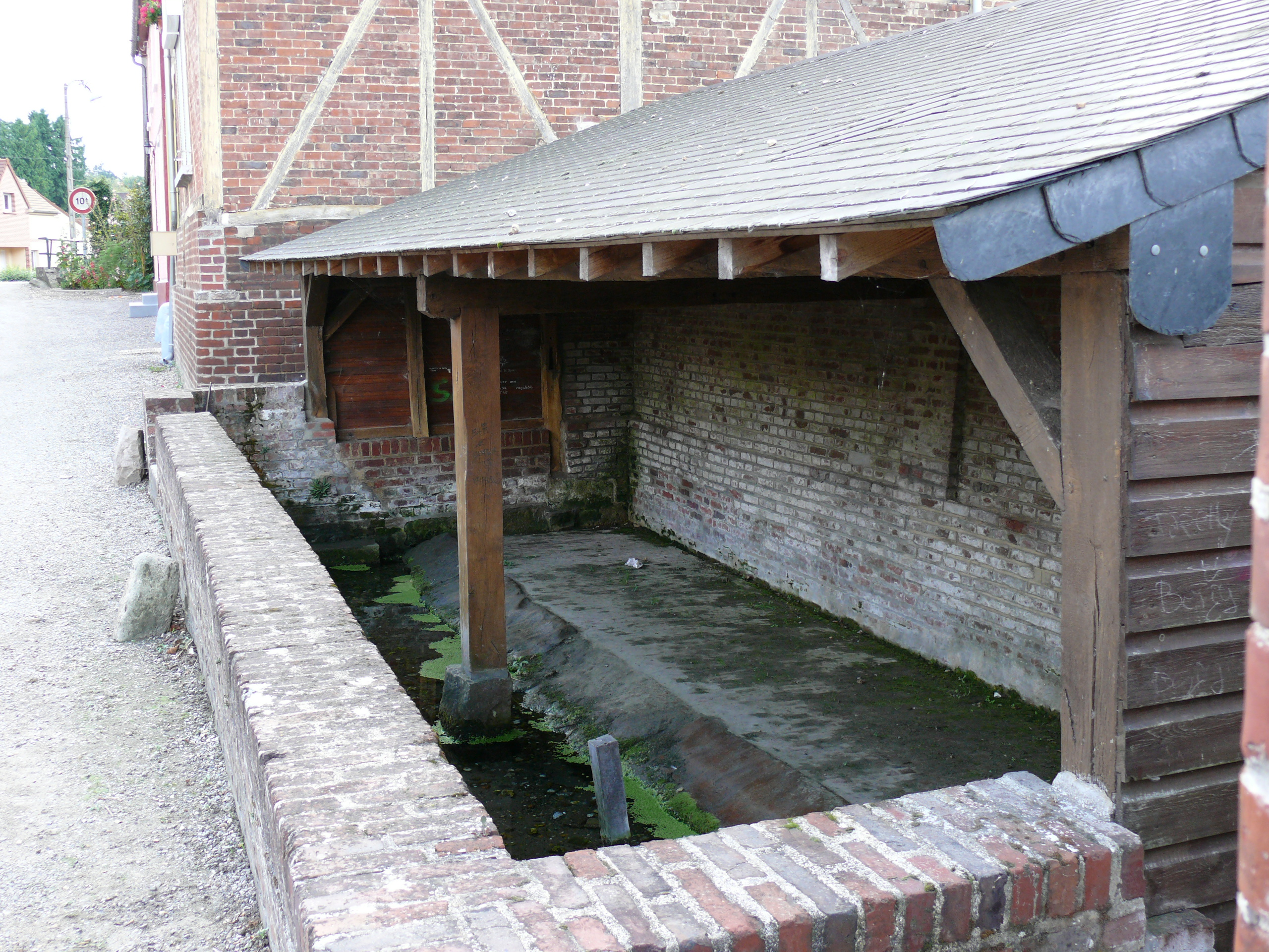 Lavoir de Marseille-en-Beauvaisis (Oise - Picardie - France)